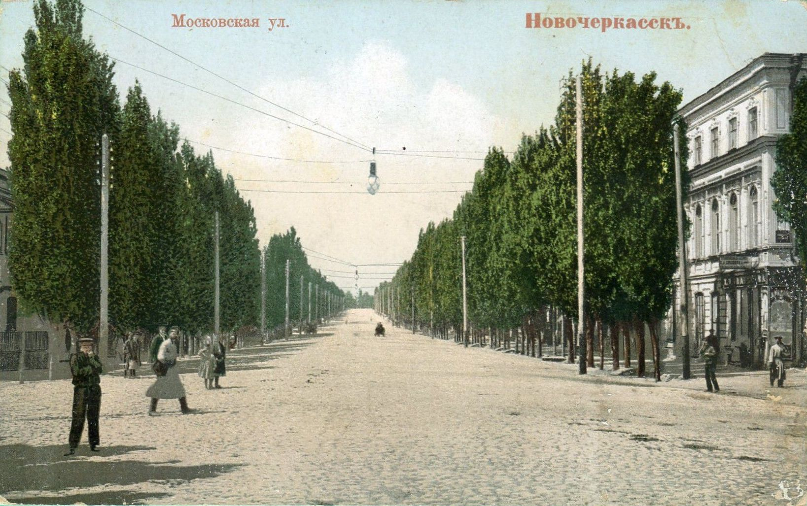 Новочеркасск, Московская улица